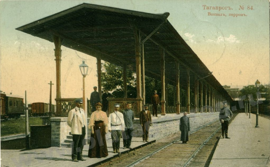 Здание железнодорожного вокзала, Таганрог Ростовская область РФ